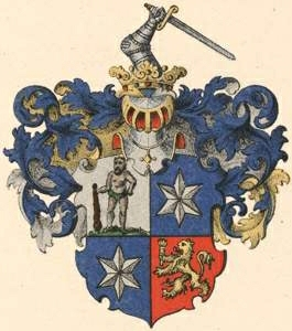 Barsi suguvõsa aadlivapp